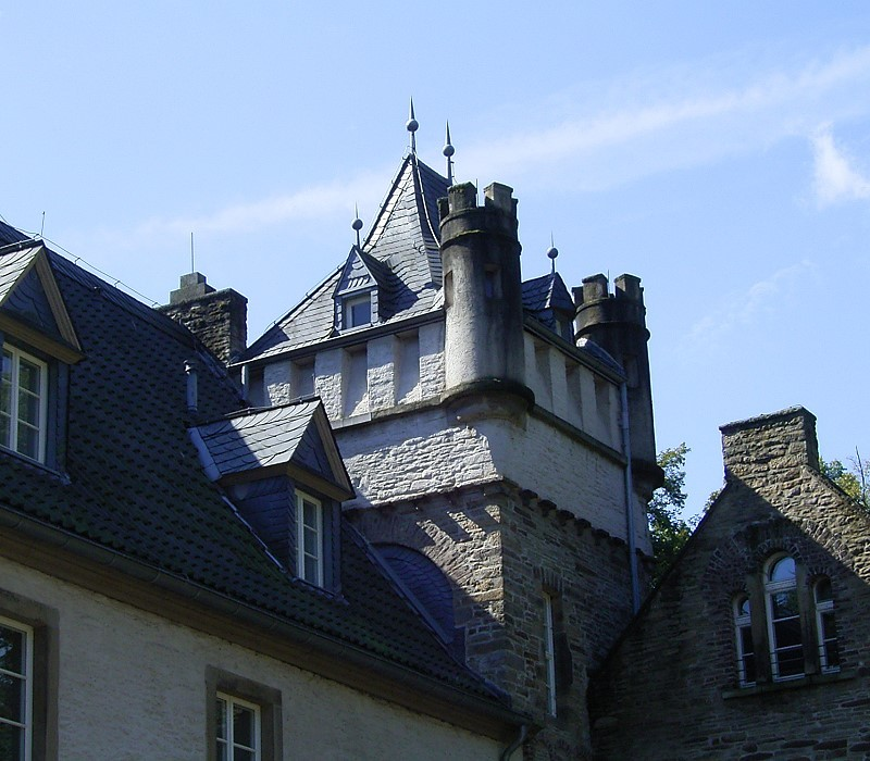 Wasserschloss Werdringen in Hagen